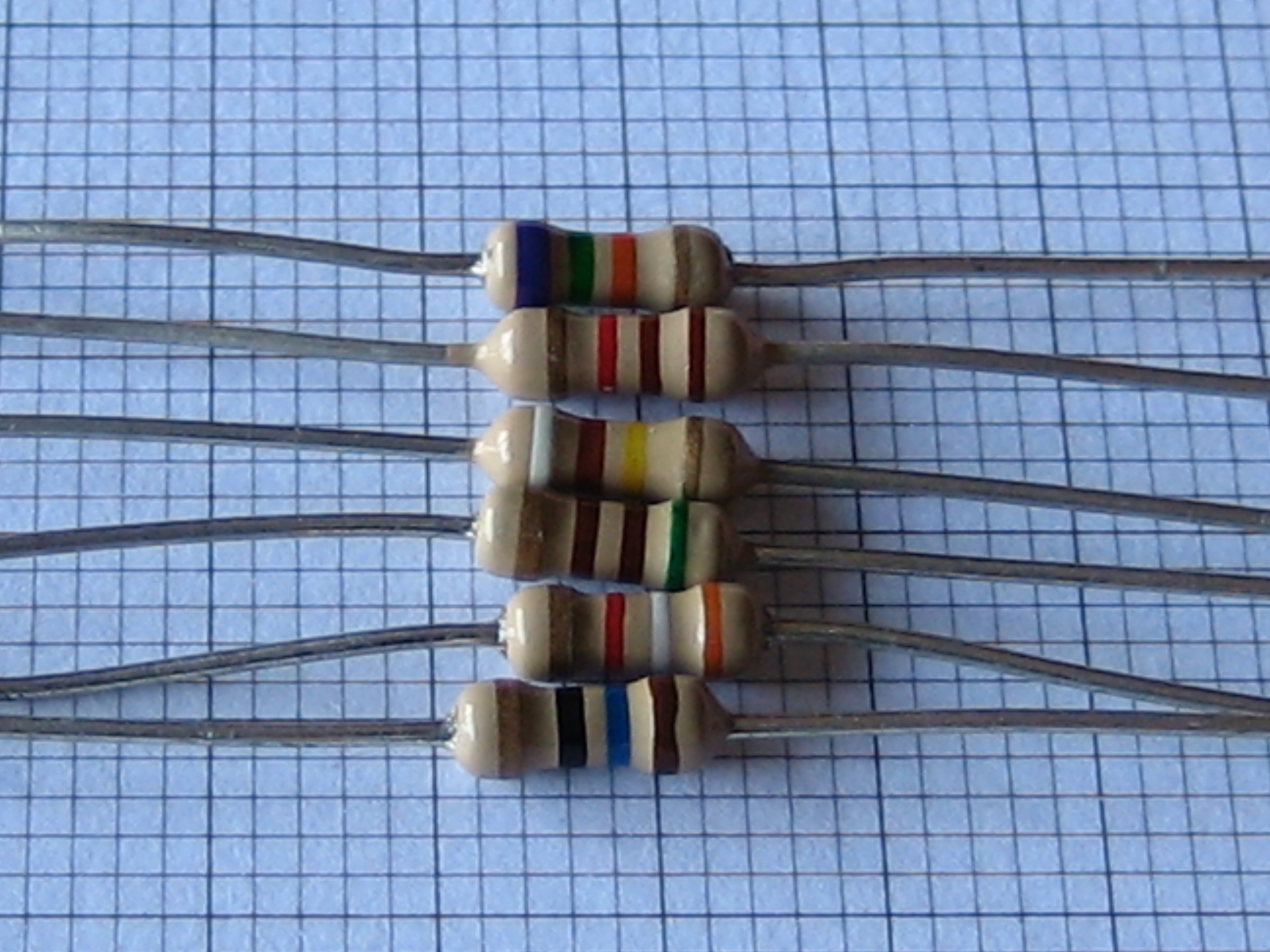 Resistencias de 250 mW e tolerancia de 5% (cor dourado) sobre papel milimetrico.